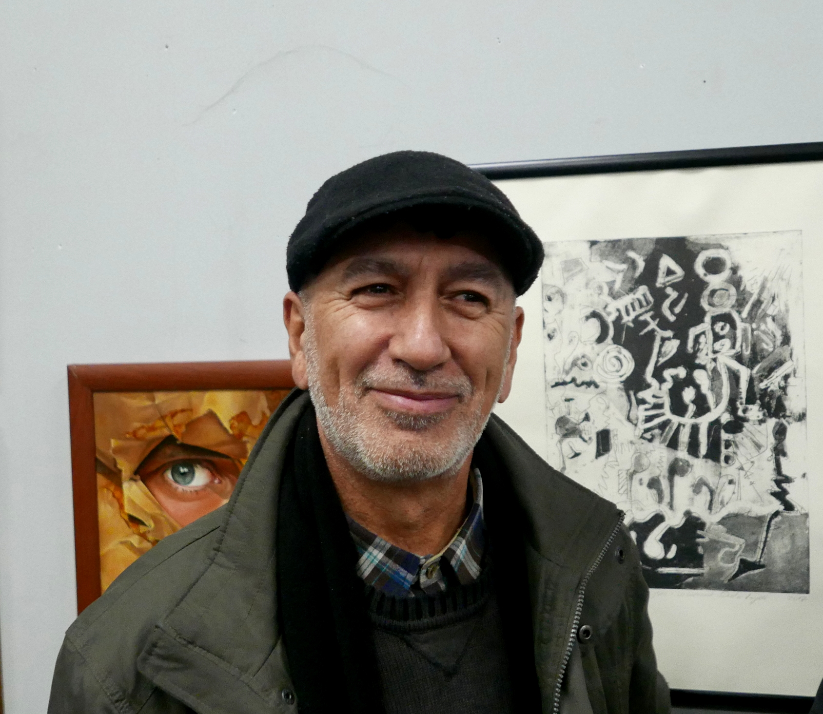 Mjesher i fotografisë